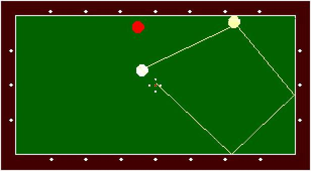 tiro a giro elaborato in paint